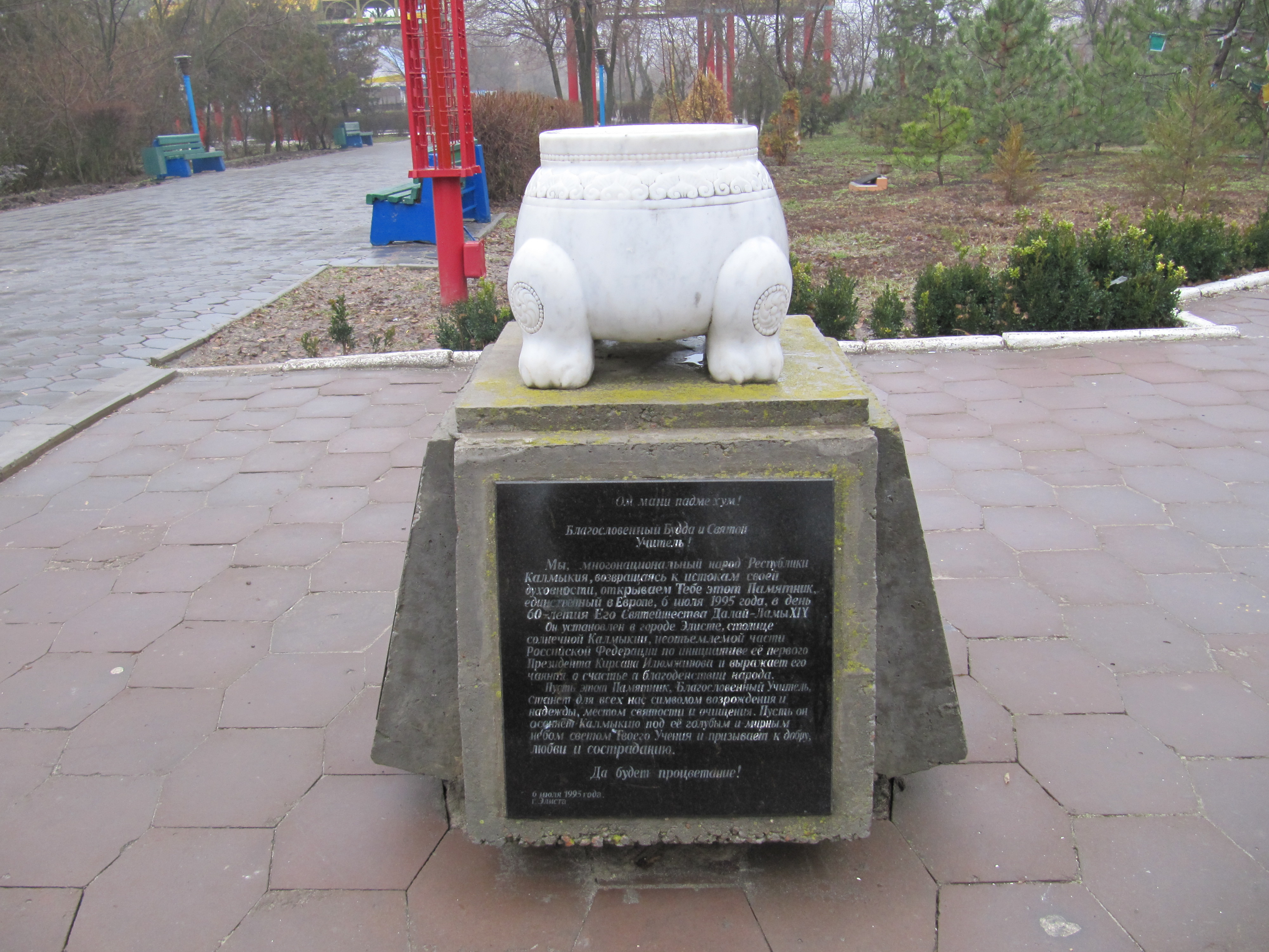 Памятная чаша возле статуи Будды Шакьямуни, Элиста, Калмыкия